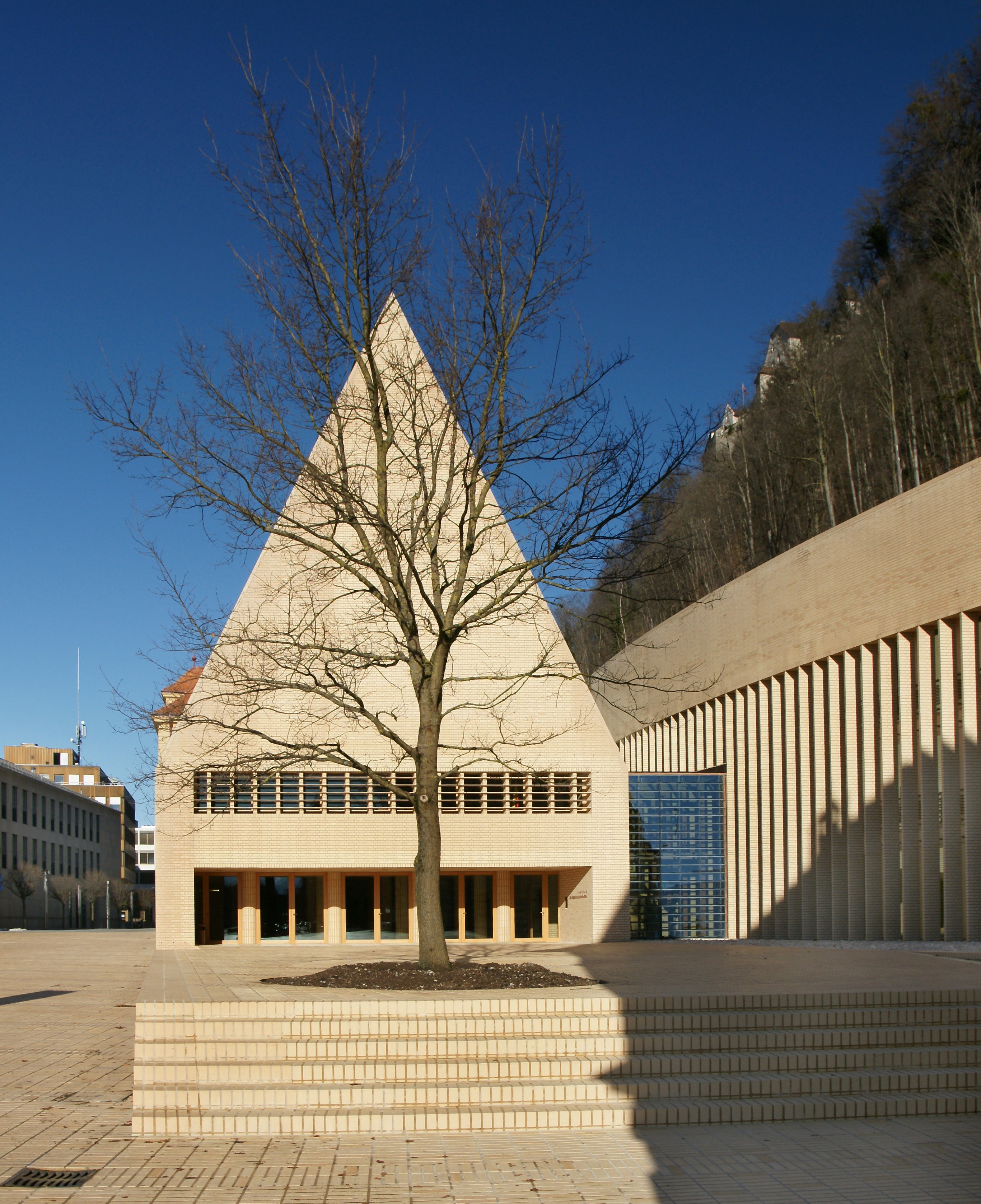 Details: Hohes Haus und Langes Haus des Liechtensteinischen Landtags in Vaduz erbaut 2007. Architekt Hansjörg Göritz.